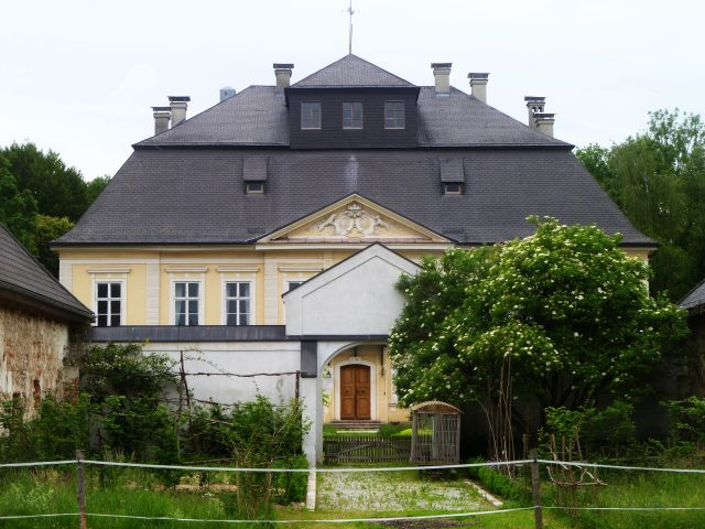 Schloss_Pfaffstätt heute